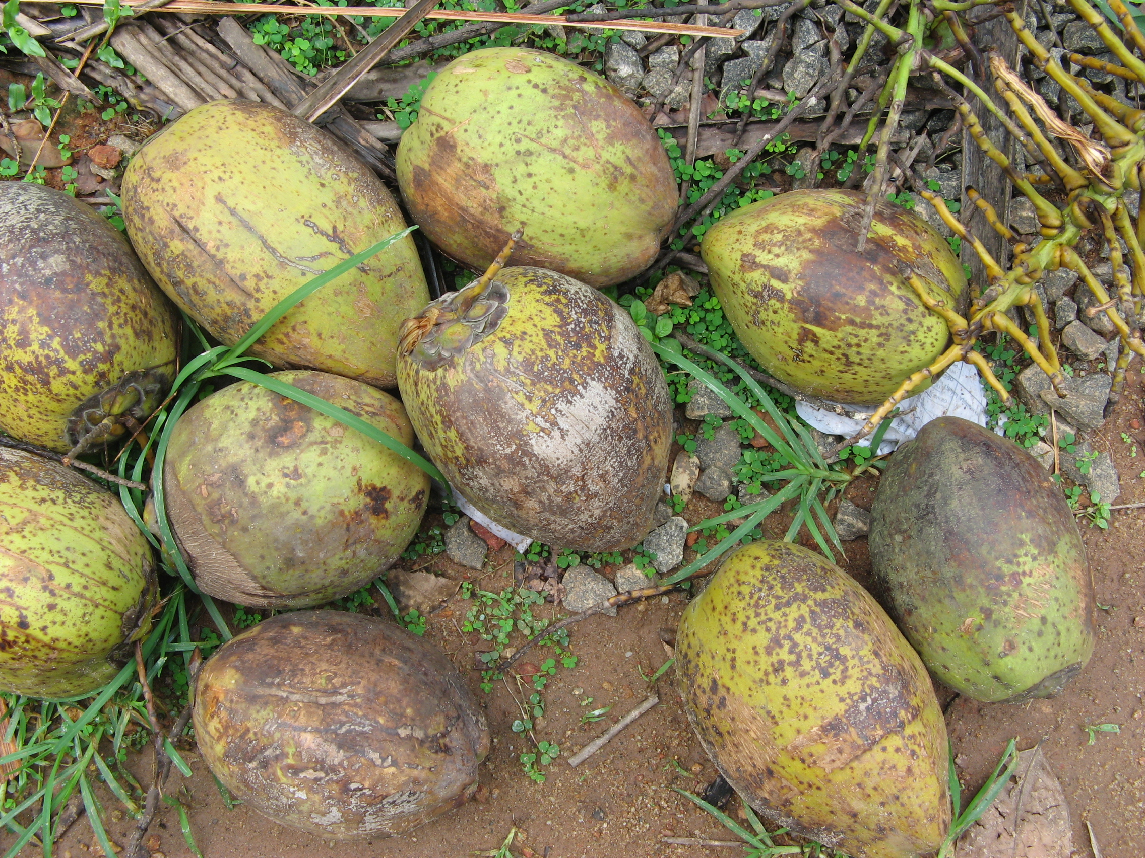 Thengakal